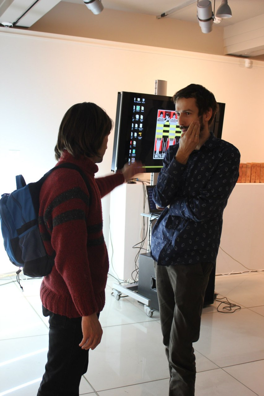 Андрей Сяйлев Арт-елка 2014. Галерея Виктория